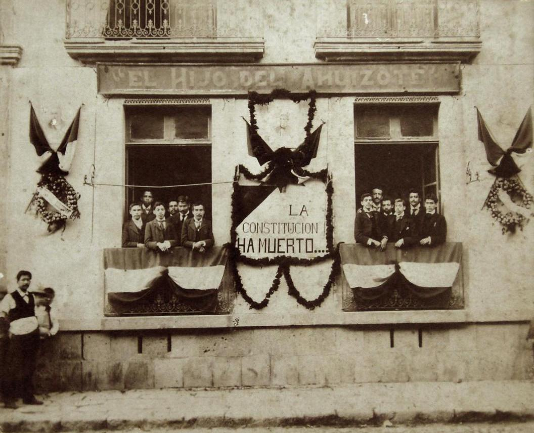 Protesta en las oficinas de El hijo de El Ahuizote 1903. En la fotografía aparecen: Federico Pérez Fernández, Santiago de la Hoz, Manuel Sarabia, Benjamín Millán, Evaristo Guillén, Gabriel Pérez Fernández, Juan Sarabia, Antonio Díaz Soto y Gama, Rosalío Bustamante, Tomás Sarabia y Ricardo y Enrique Flores Magón.